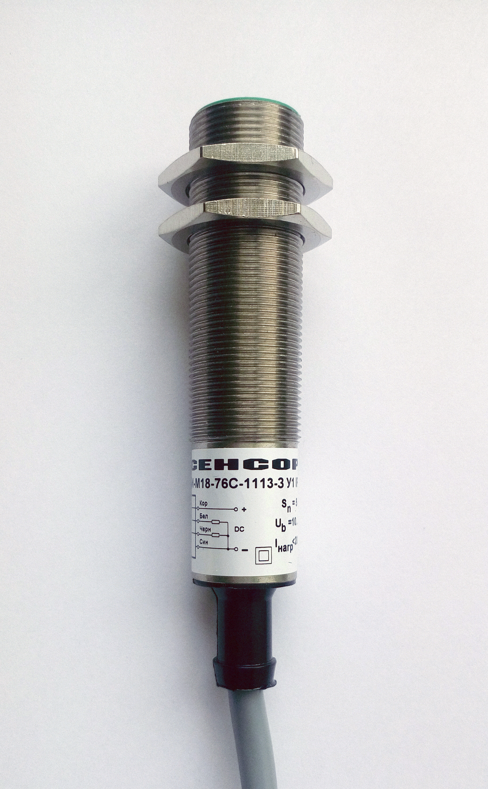 Бесконтактным выключателем (датчиком) называется выключатель, приводимый в действие внешним объектом без механического контакта выключателя и объекта. Коммутация нагрузки производится полупроводниковыми элементами. Все это обеспечивает высокую надёжность работы бесконтактных датчиков. Индуктивные бесконтактные датчики (выключатели) серии ВБИ изготавливаются по ГОСТ Р 50030.5.2 и по ТУ 4218-001-51824872-2008.